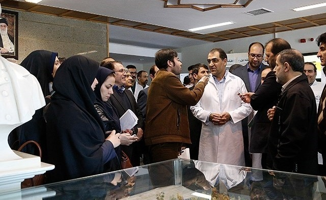 مراسم بهره برداری از مجموعه پروژه های انستیتو پاستور